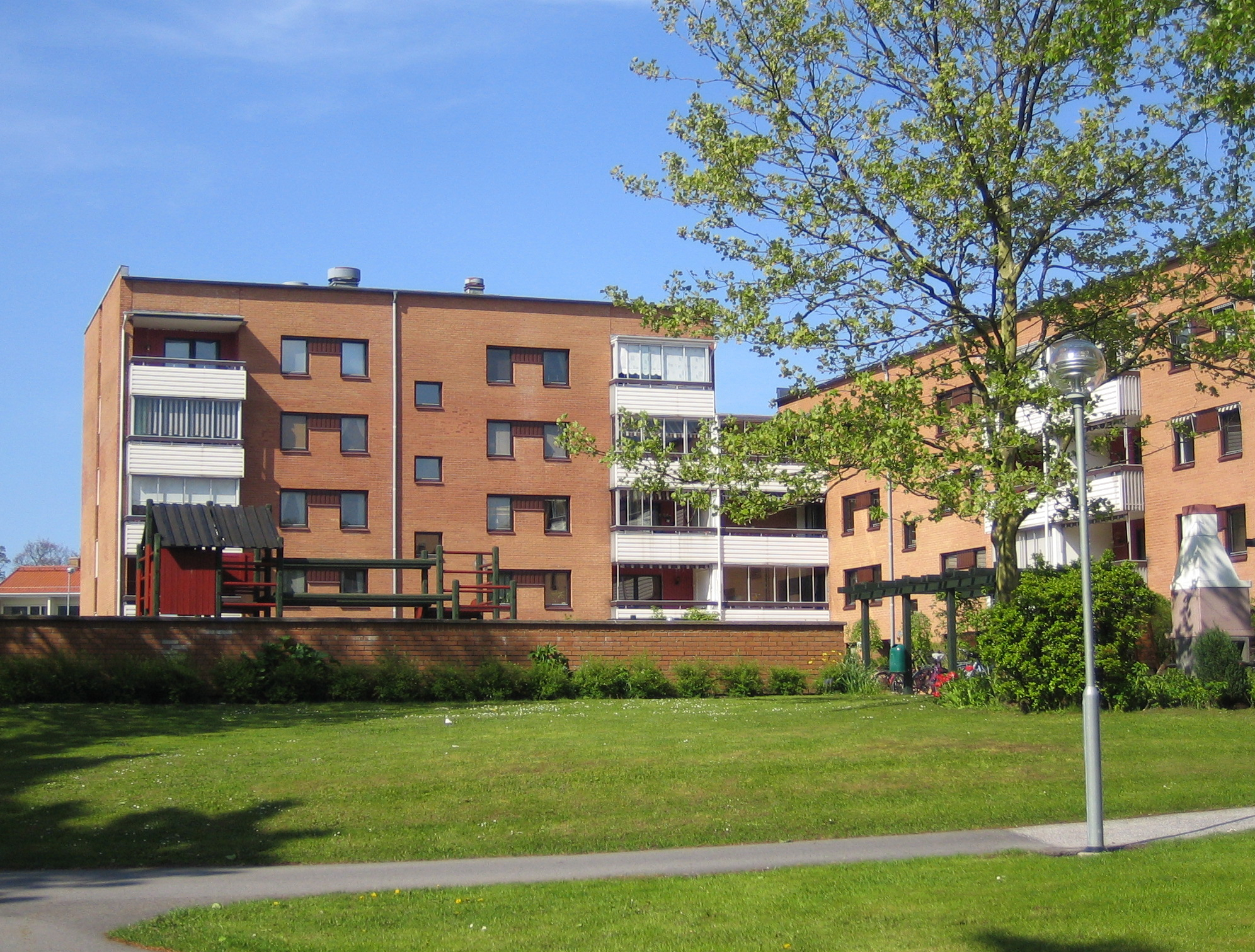 Annetorp, Malmö